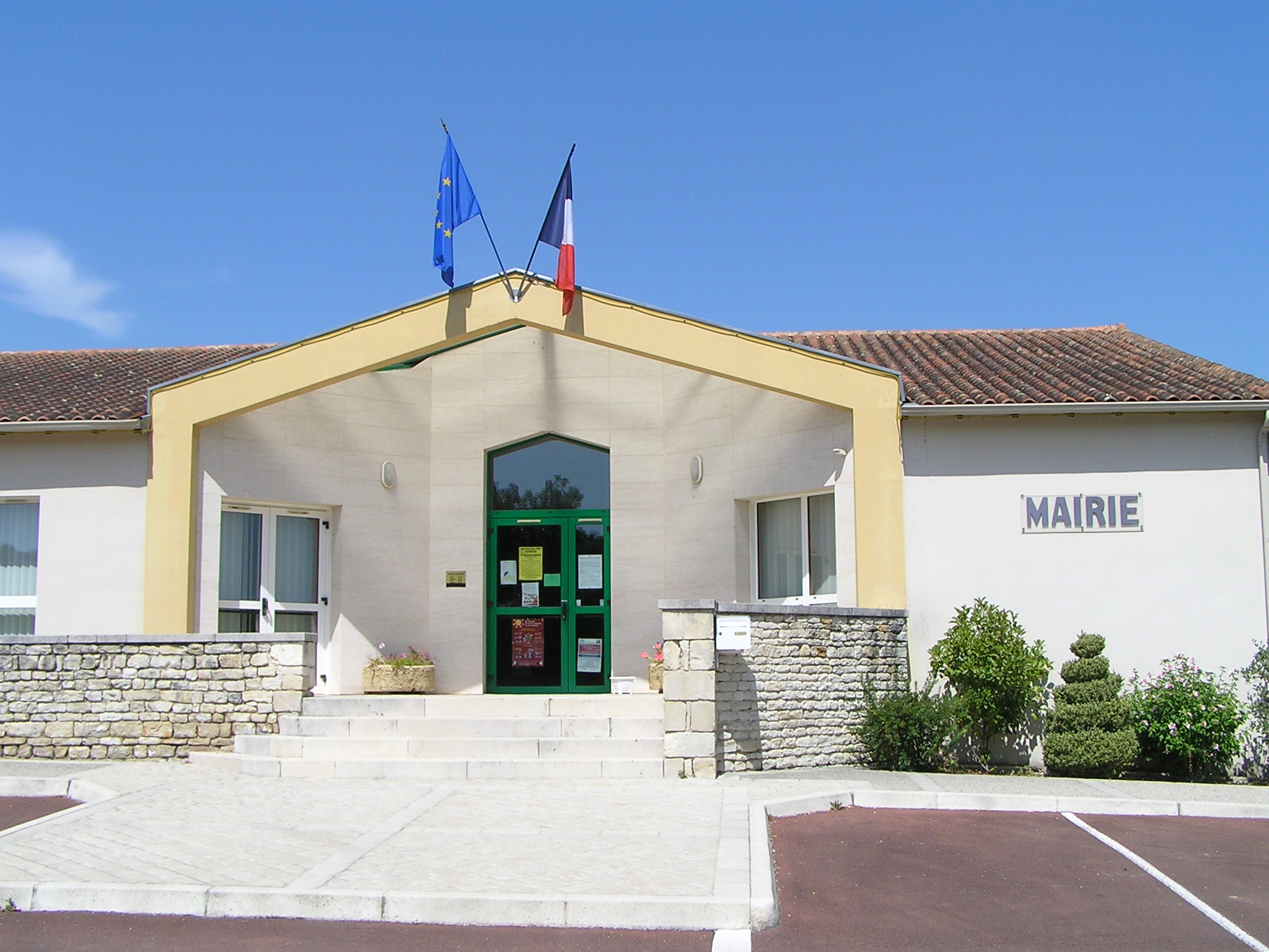 mairie d'Asnières-sur-Nouère